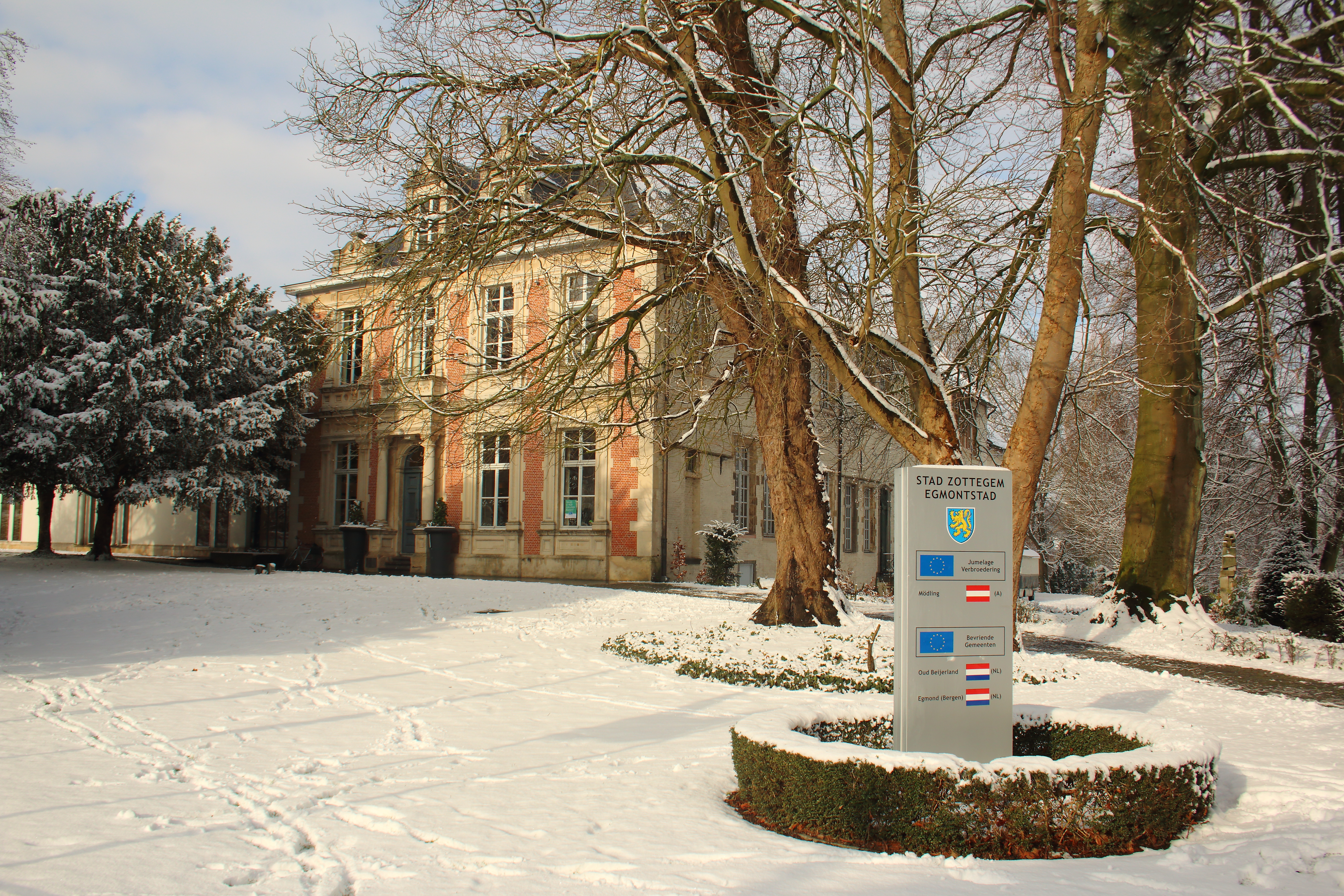 Egmontkasteel/ Kasteel van Egmont, Zottegem, Vlaanderen, België